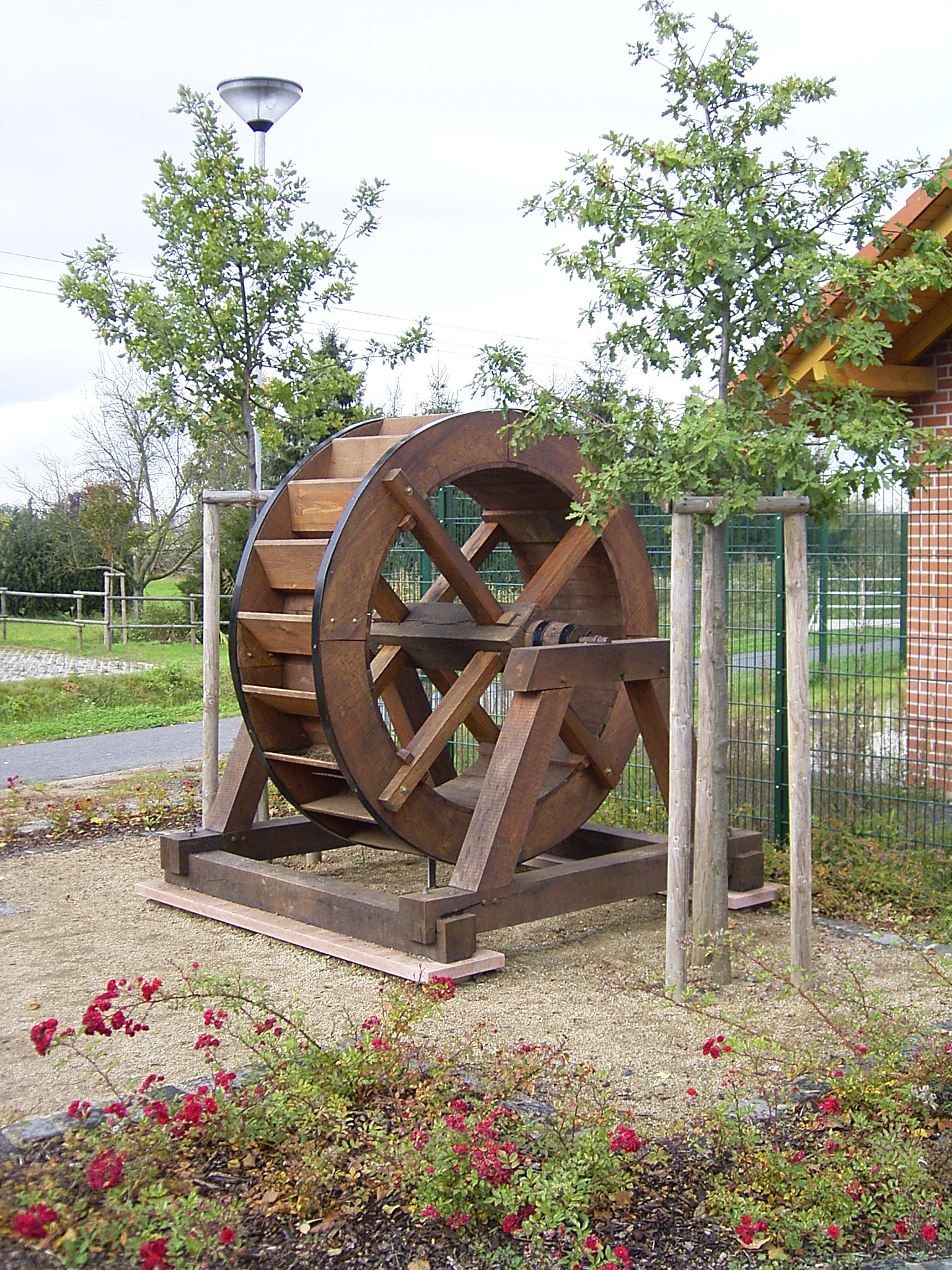 Rodgau-Weiskirchen, Hessen, das Mühlrad aus Donja Stubica steht an der Rodau